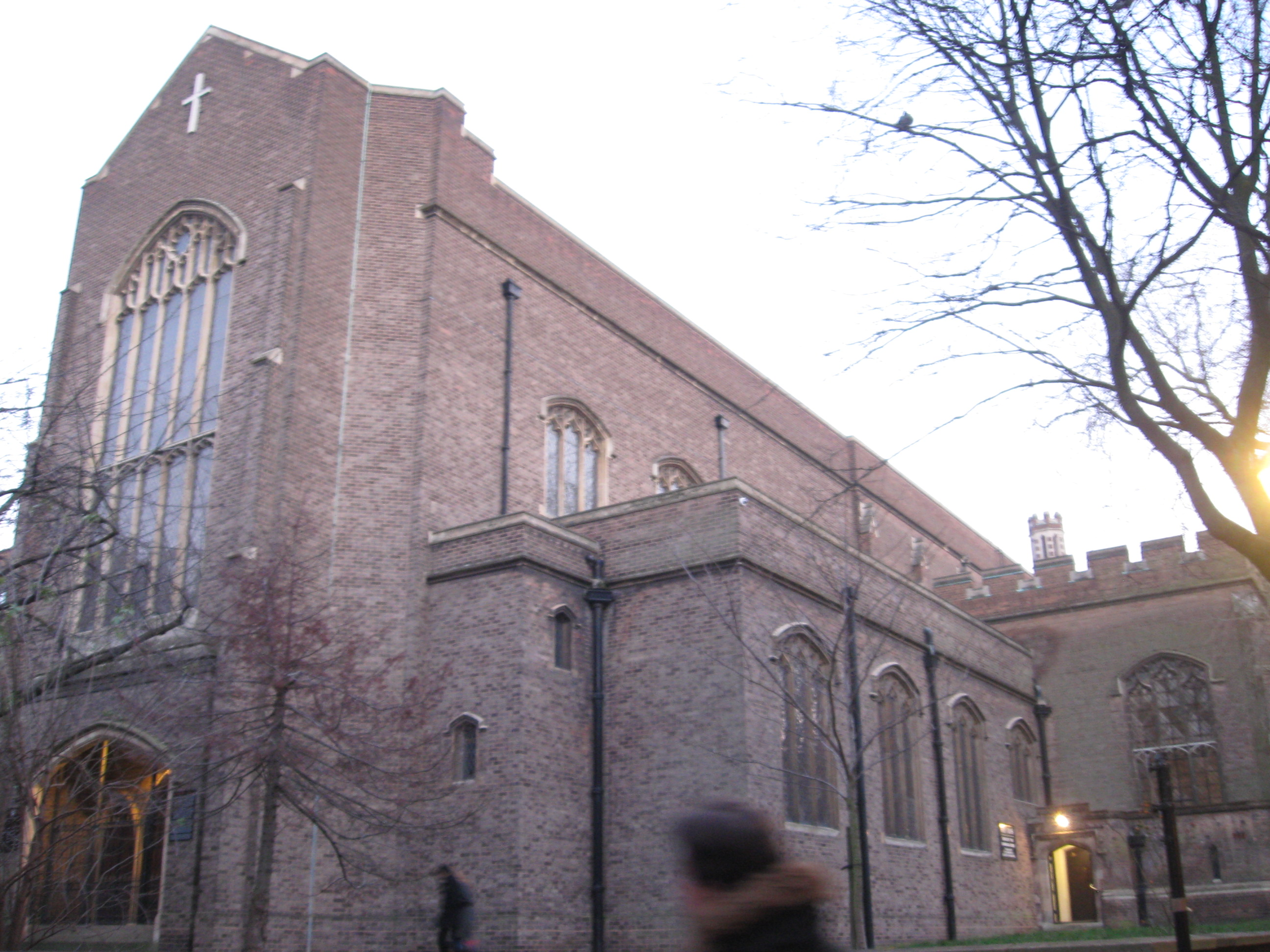 Kościół Św. Krzyża